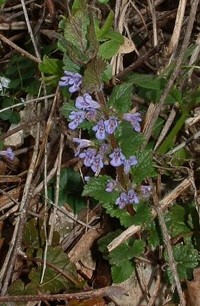 lierre terrestre